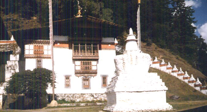 Монастырь Курдже Лакханг в Бумтанге (Бутан), место медитации Падмасамбхавы